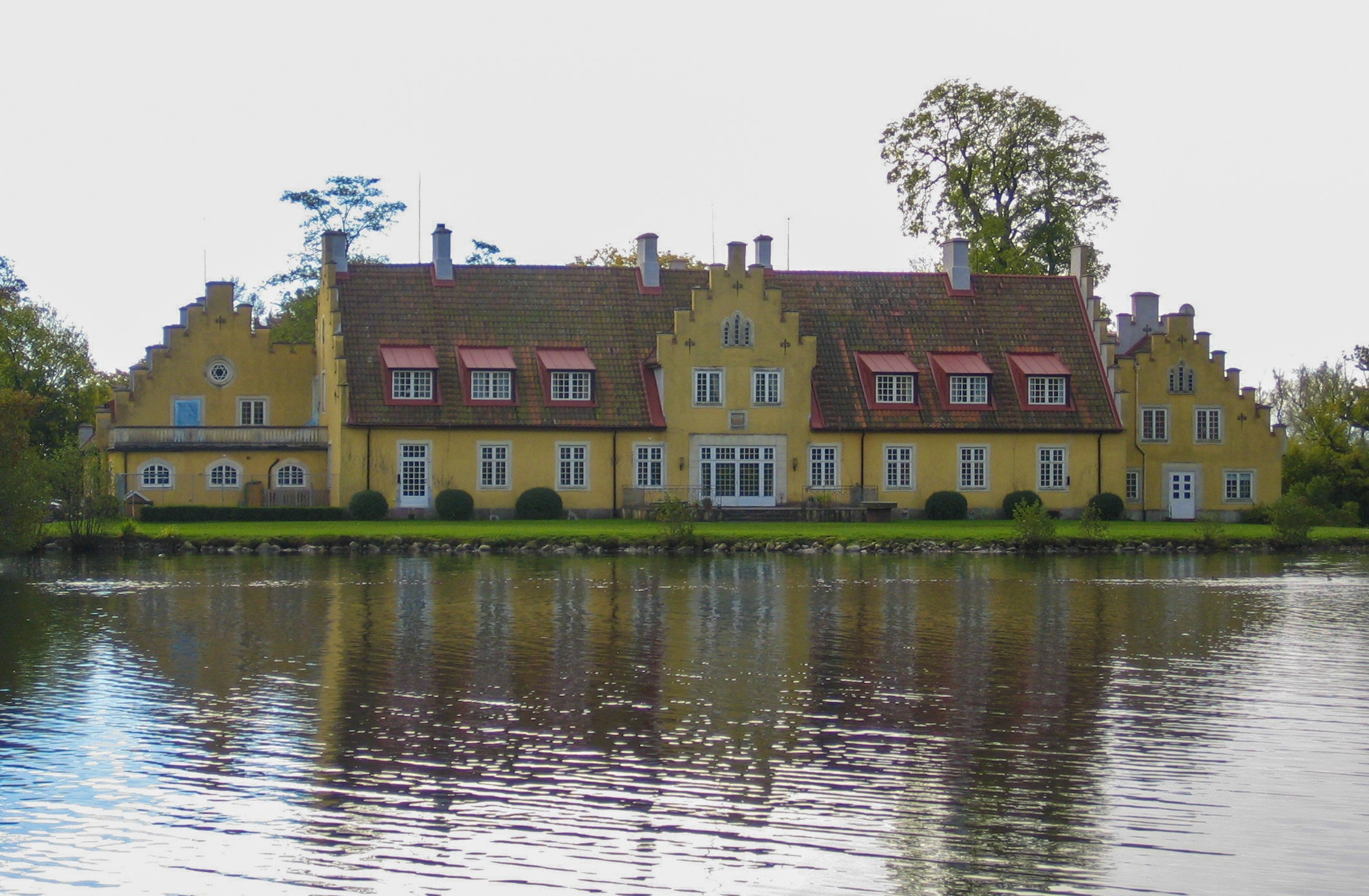 Swedish manor Rydsgård, Skåne, Sweden.